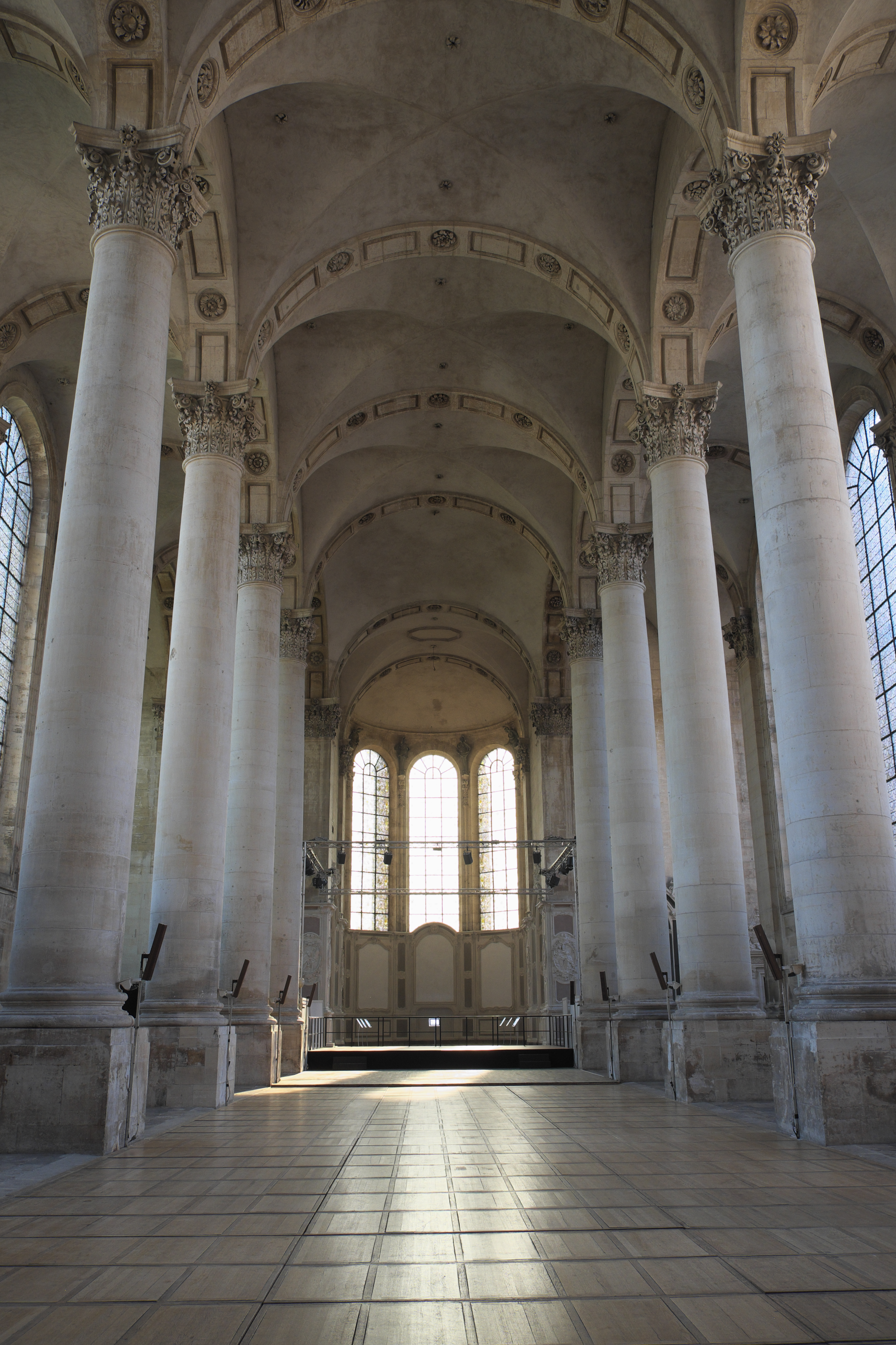 Ehemalige Prämonstratenserabteikirche Sainte-Marie-Majeure in Pont-à-Mousson im Département Meurthe-et-Moselle (Region Grand Est/Frankreich), Innenraum